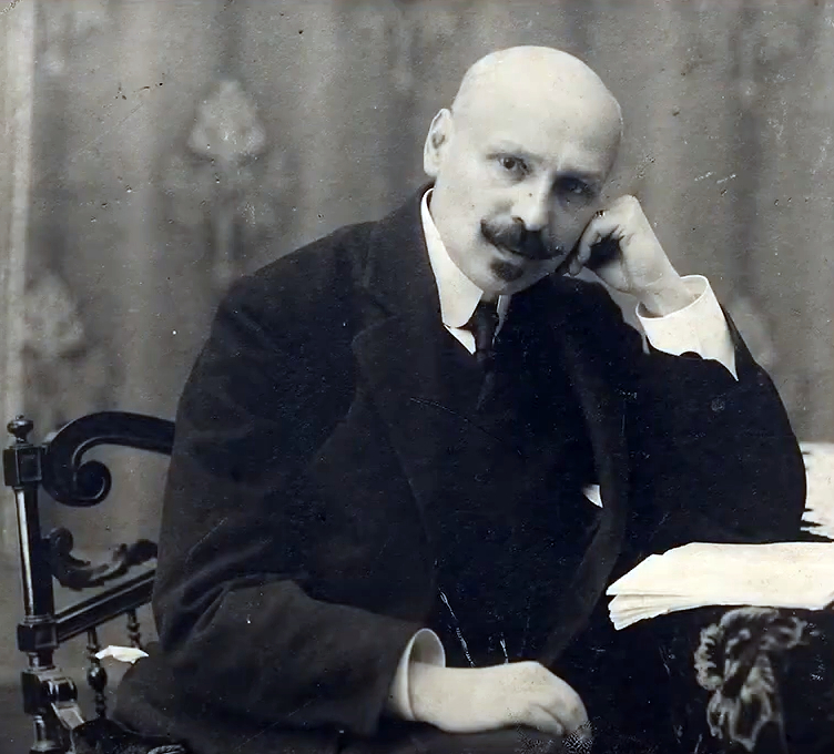 Mykhaylo Kotsyubynskyj